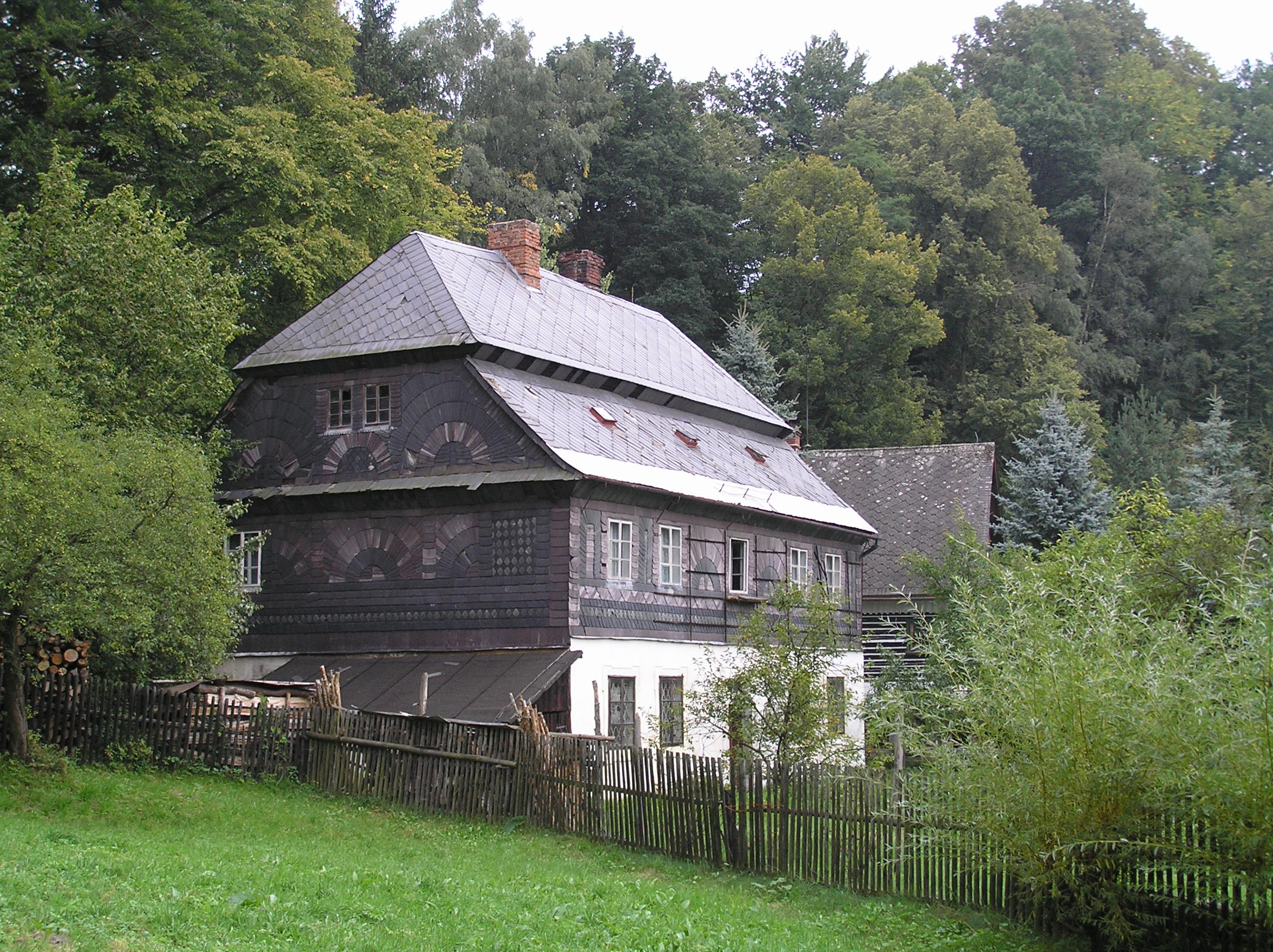 lidová architektura ve Velenicích, okres Česká Lípa.